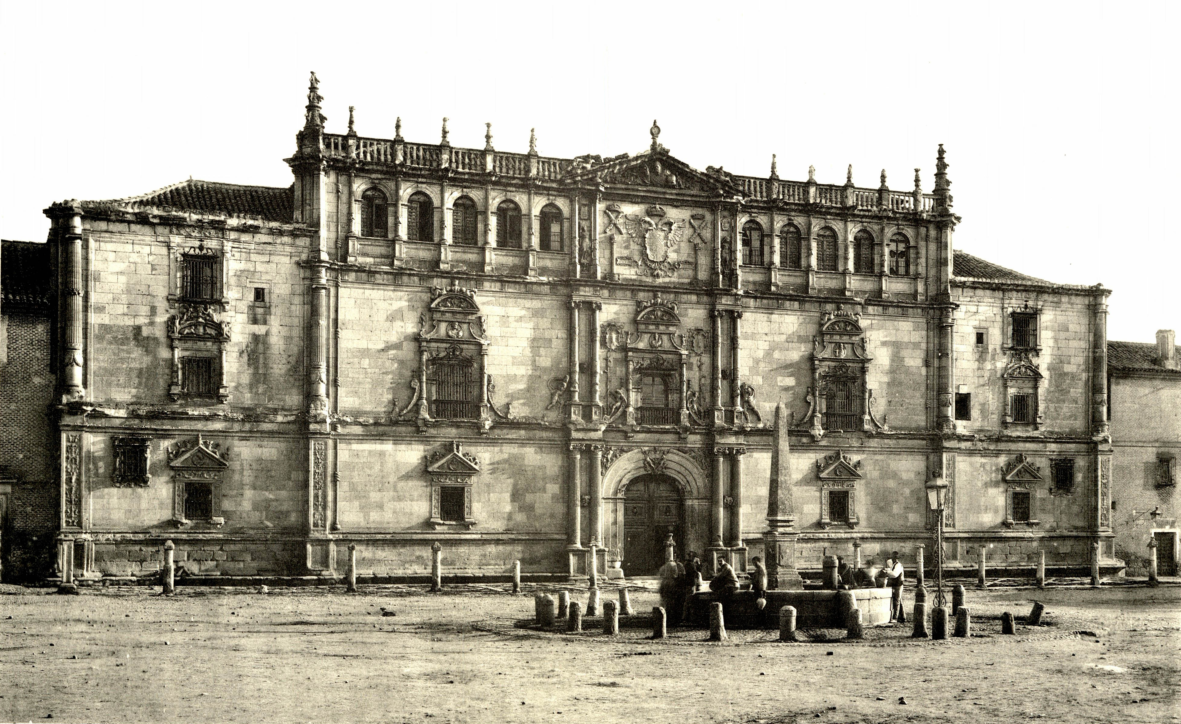 Fotografía de Constantin Uhde realizada en 1888, en la que aparece la fachada del Colegio Mayor de San Ildefonso de la Universidad de Alcalá (Comunidad de Madrid - España). Publicada en 1892 en el libro Baudenkmäler in Spanien und Portugal.